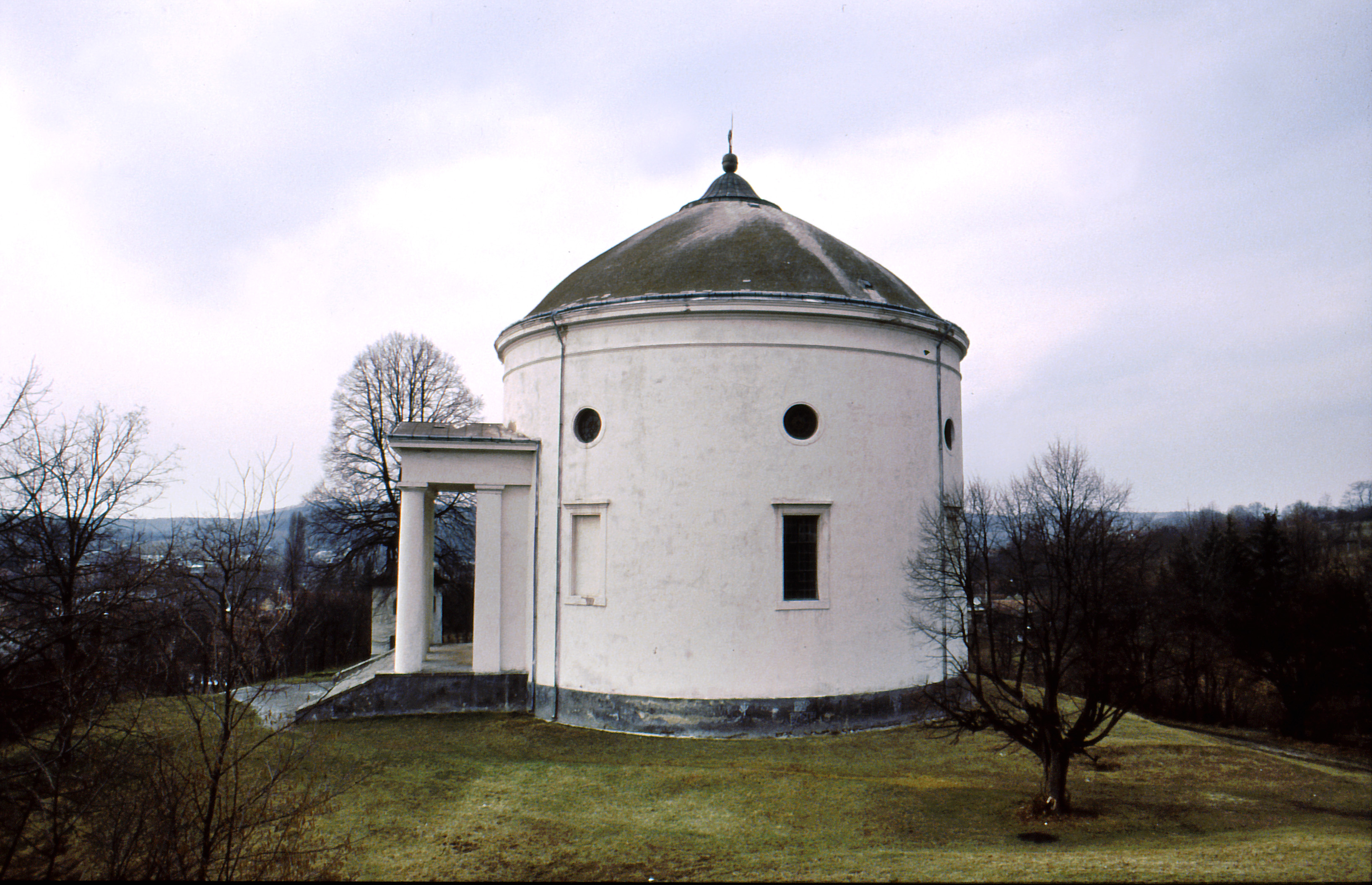 Szilvásvárad, klasszicista körtemplom, Hild József tervei alapján, épült: 1837-1845.